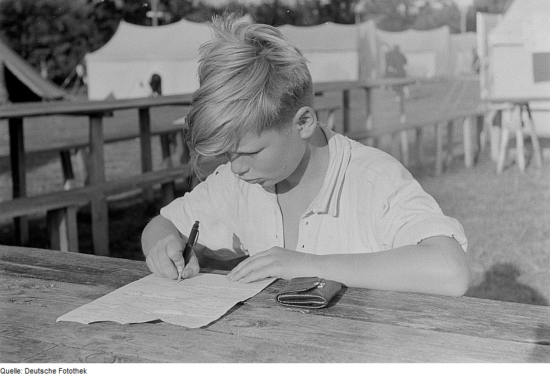 Original image description from the Deutsche Fotothek Junge einen Brief schreibend